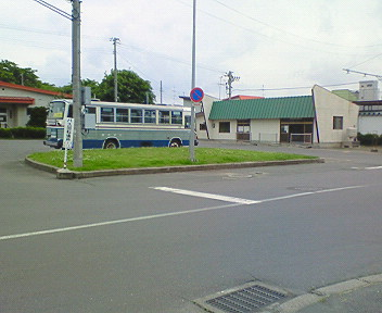 八戸市営バス岬台団地バスプール